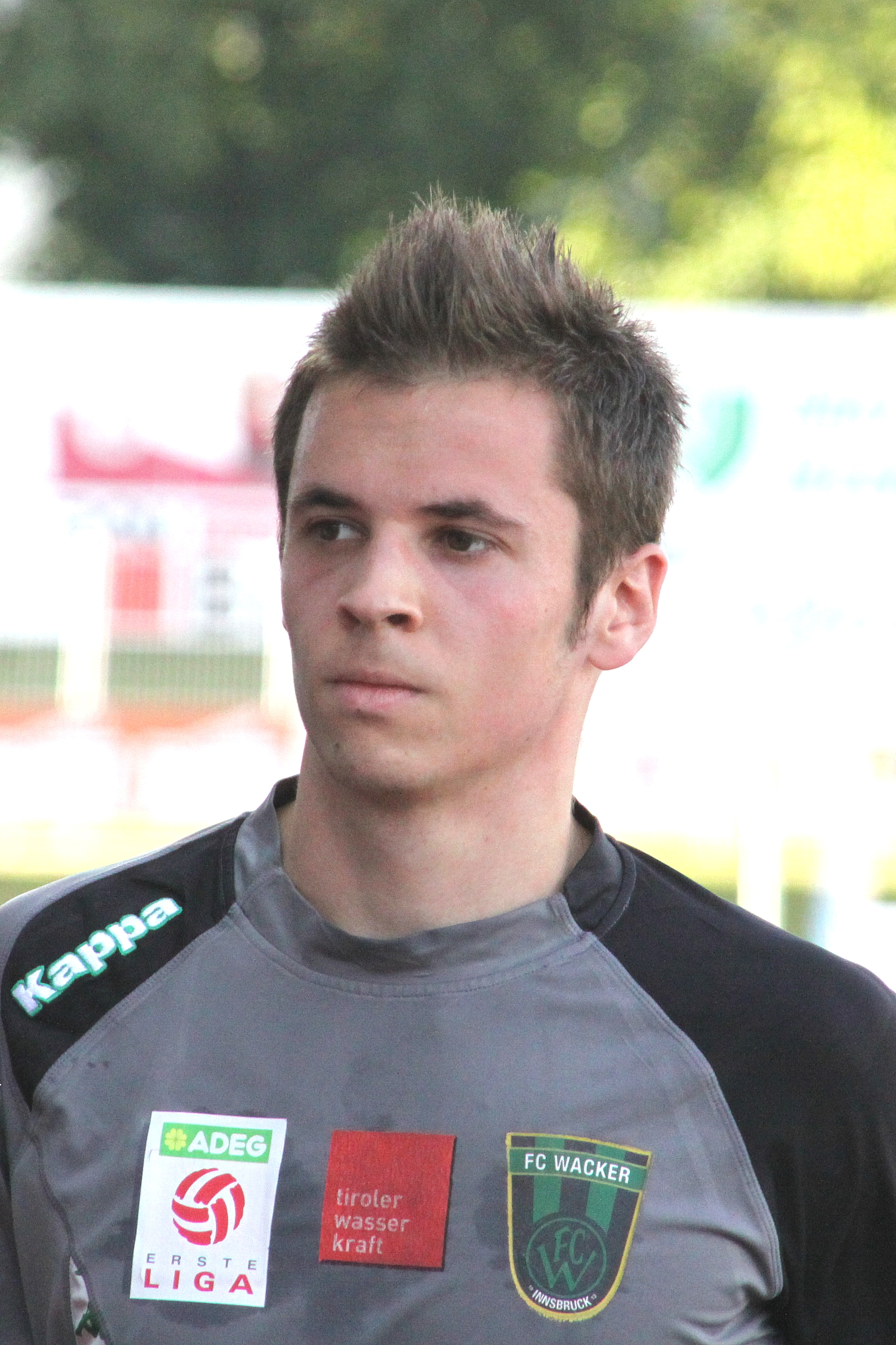 Benjamin Pranter - FC Wacker Innsbruck (1)